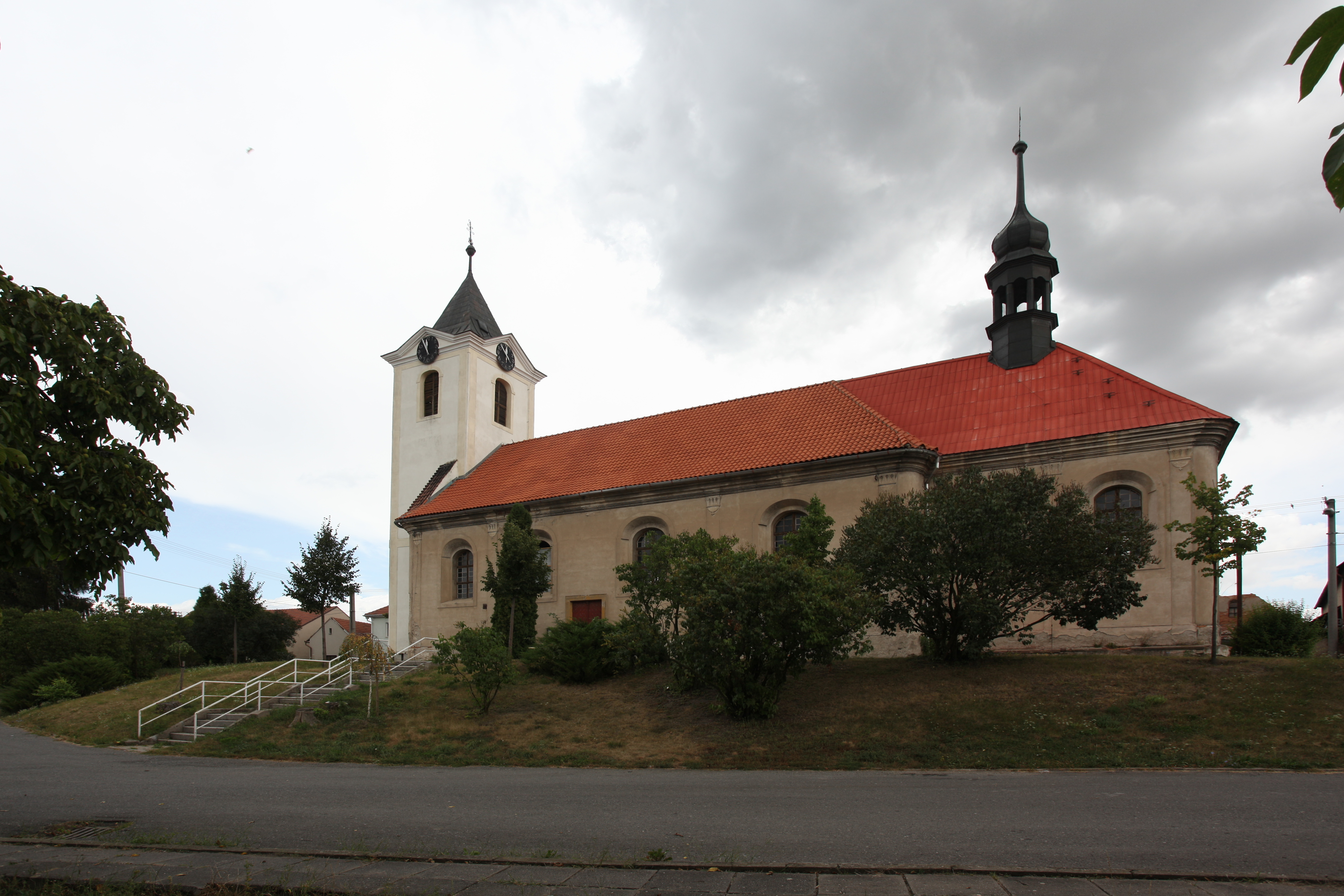 Kostelní Hlavno, kostel svatého Petra v okovech.